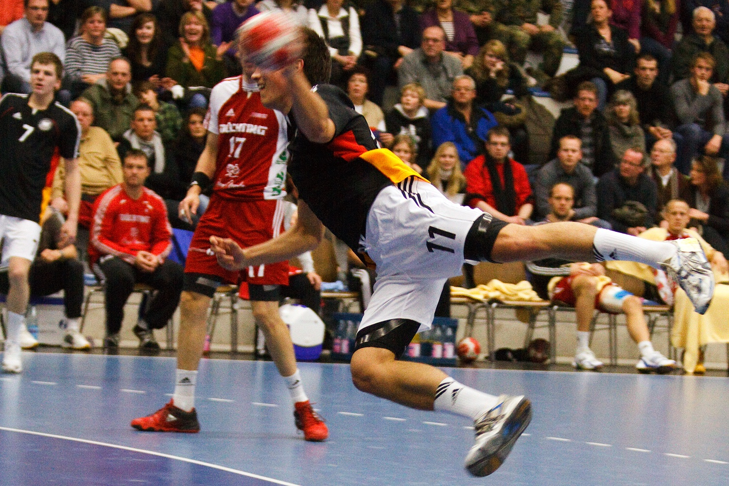 Maxipark Arena, Hamm, Datum/Uhrzeit: 25.01.2010 20:24:14